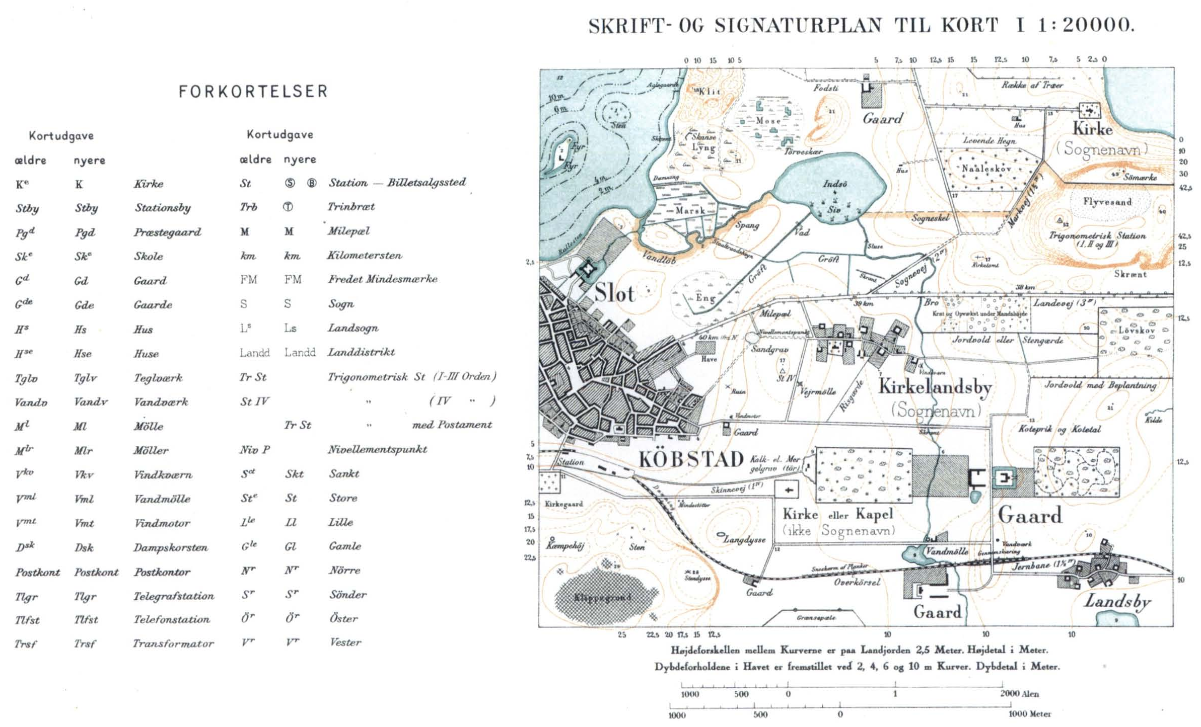 Signaturforklaring til lave målebordsblade (1901-1971)